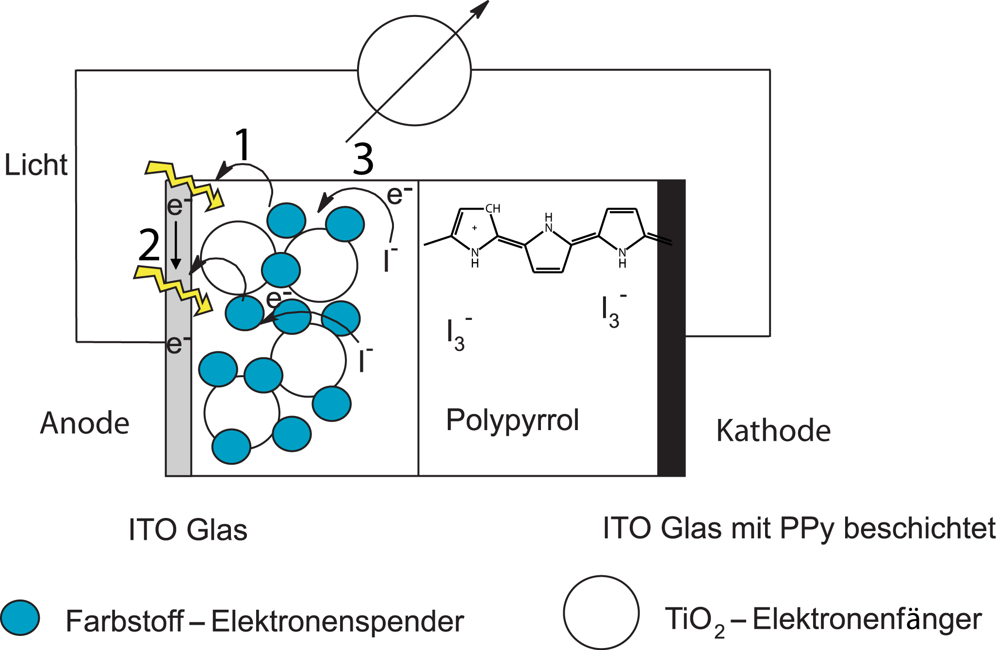 Grätzel-Zelle